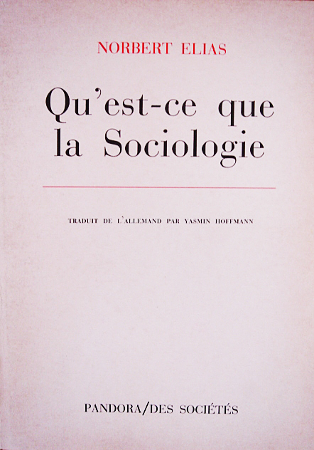 Couverture du livre de Norbert Elias, qu'est-ce que la sociologie